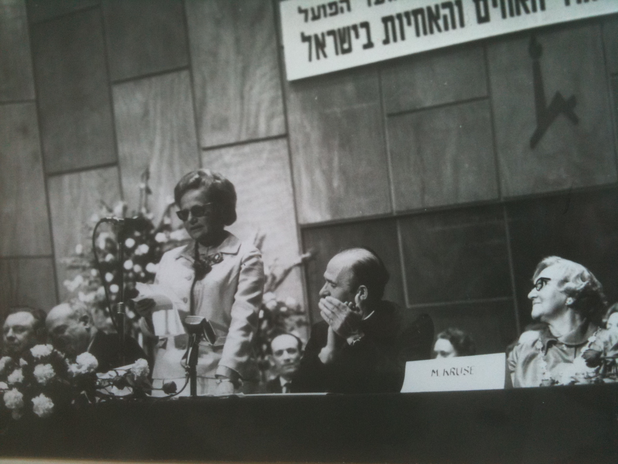 חמודה איש-שלום, יו"ר איגוד האחיות, נואמת ביום האחות מימינה: שר הבריאות ויקטור שם-טוב, משמאלה: מזכ"ל ההסתדרות יצחק בן-אהרון